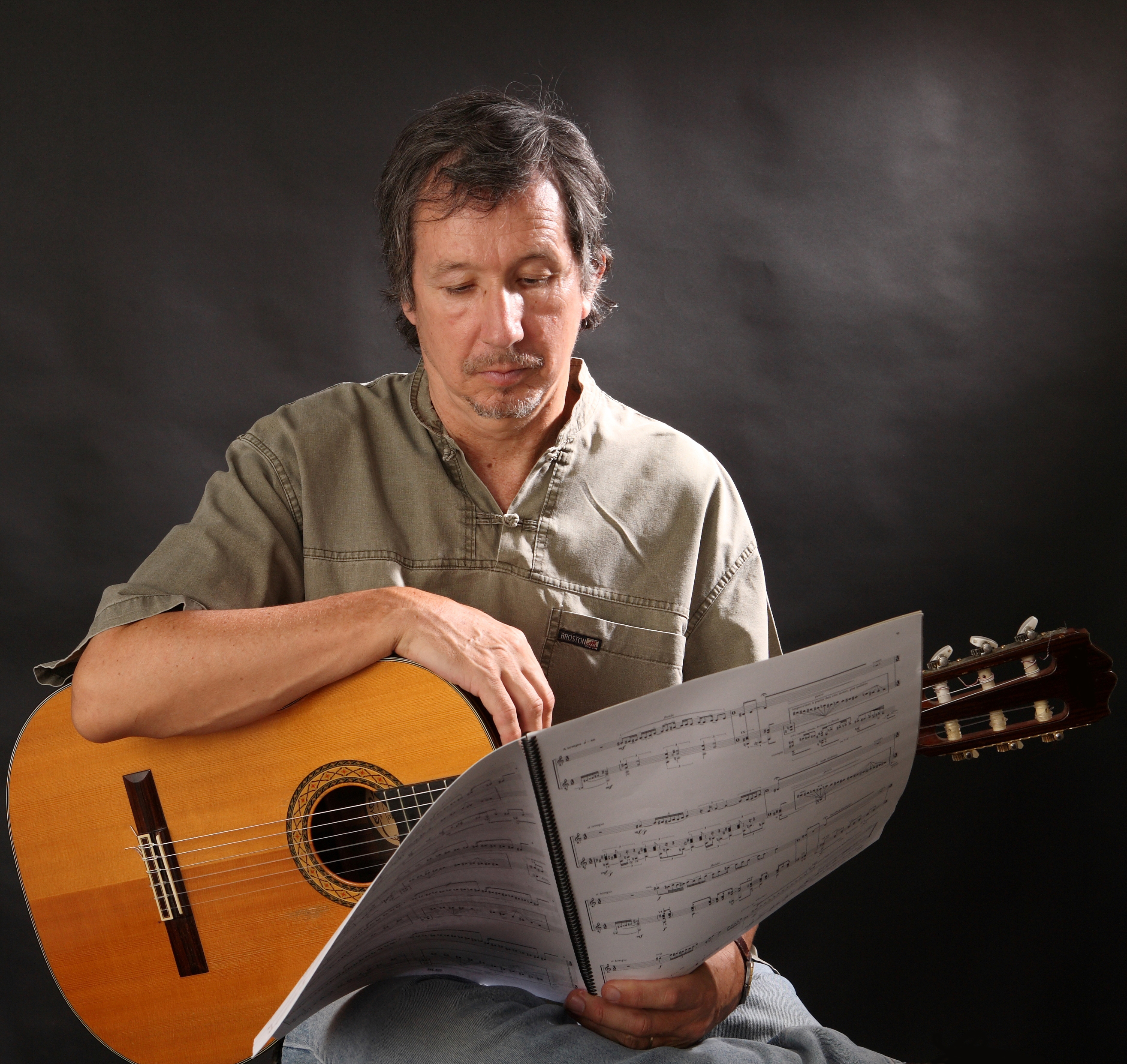 Portrait d'Éric Pénicaud, compositeur et guitariste français